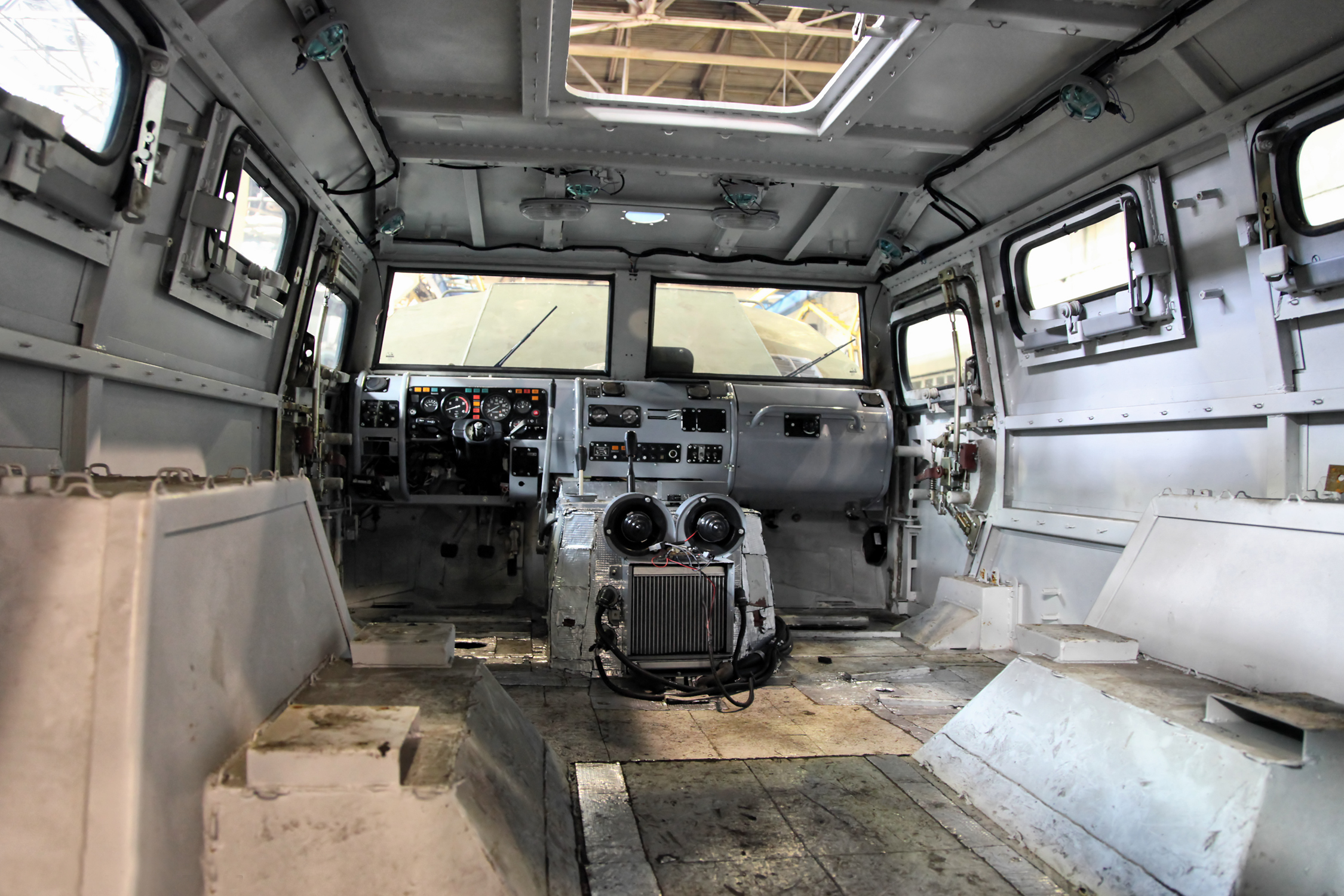 Салон бронеавтомобиля Тигр-М в процессе сборки (Tigr-M compartment)